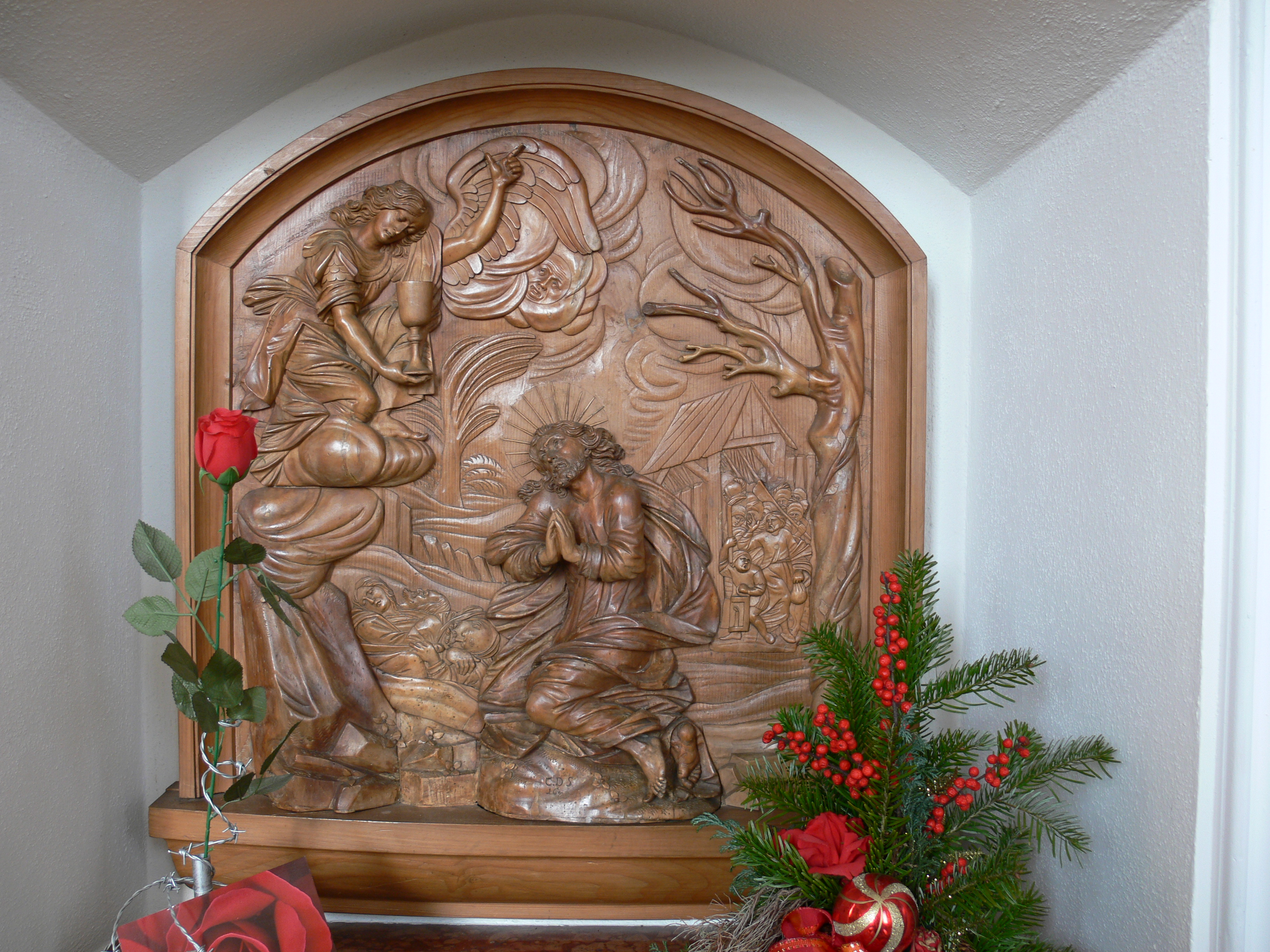 Ittendorf (Ortsteil von Markdorf), Bodenseekreis, Baden-Württemberg Pfarrkirche St. Martin, erbaut um 1660–1680 Christoph Daniel Schenk (1633–1691): Holzrelief: "Christus am Ölberg"